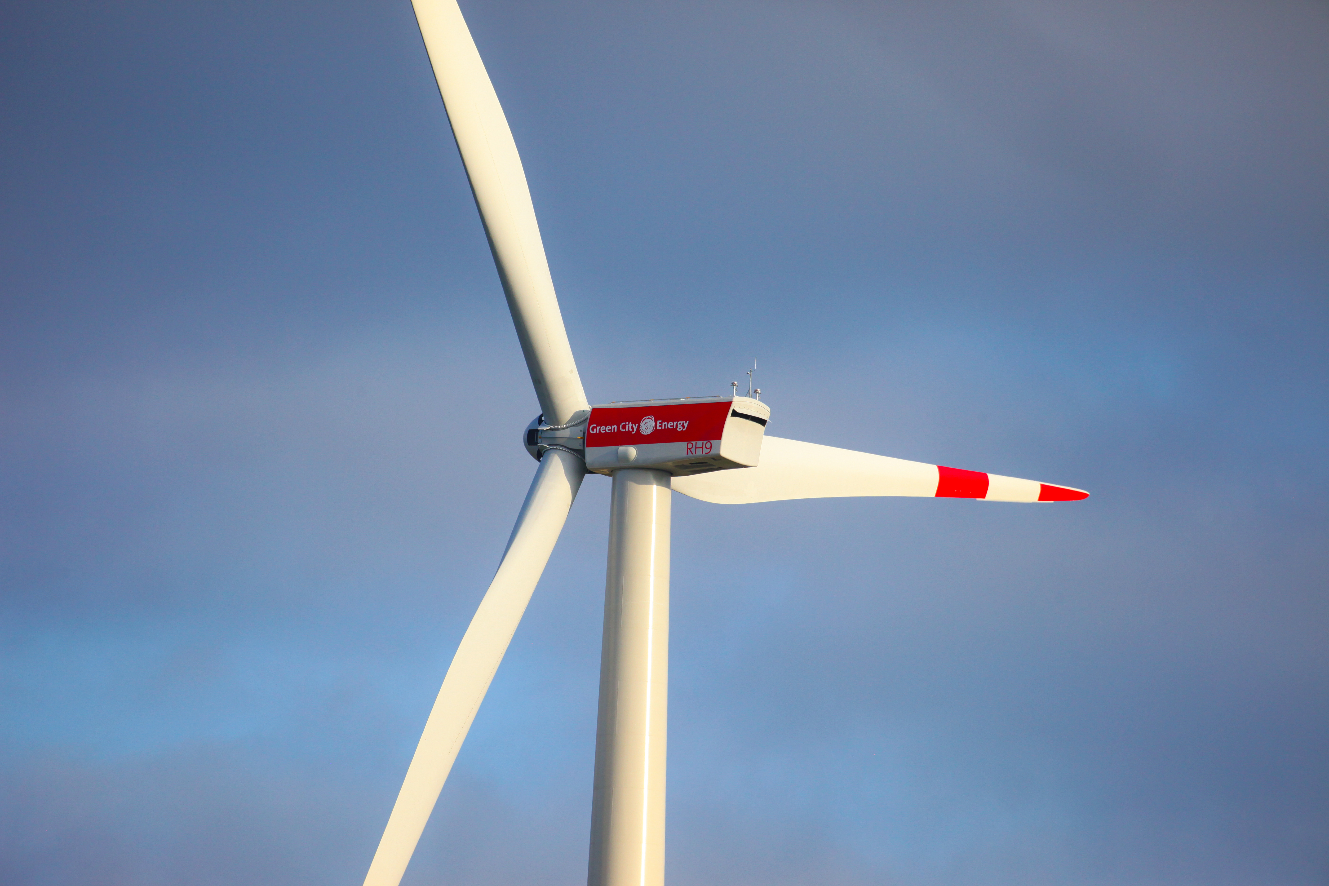 Windpark Sindersdorf